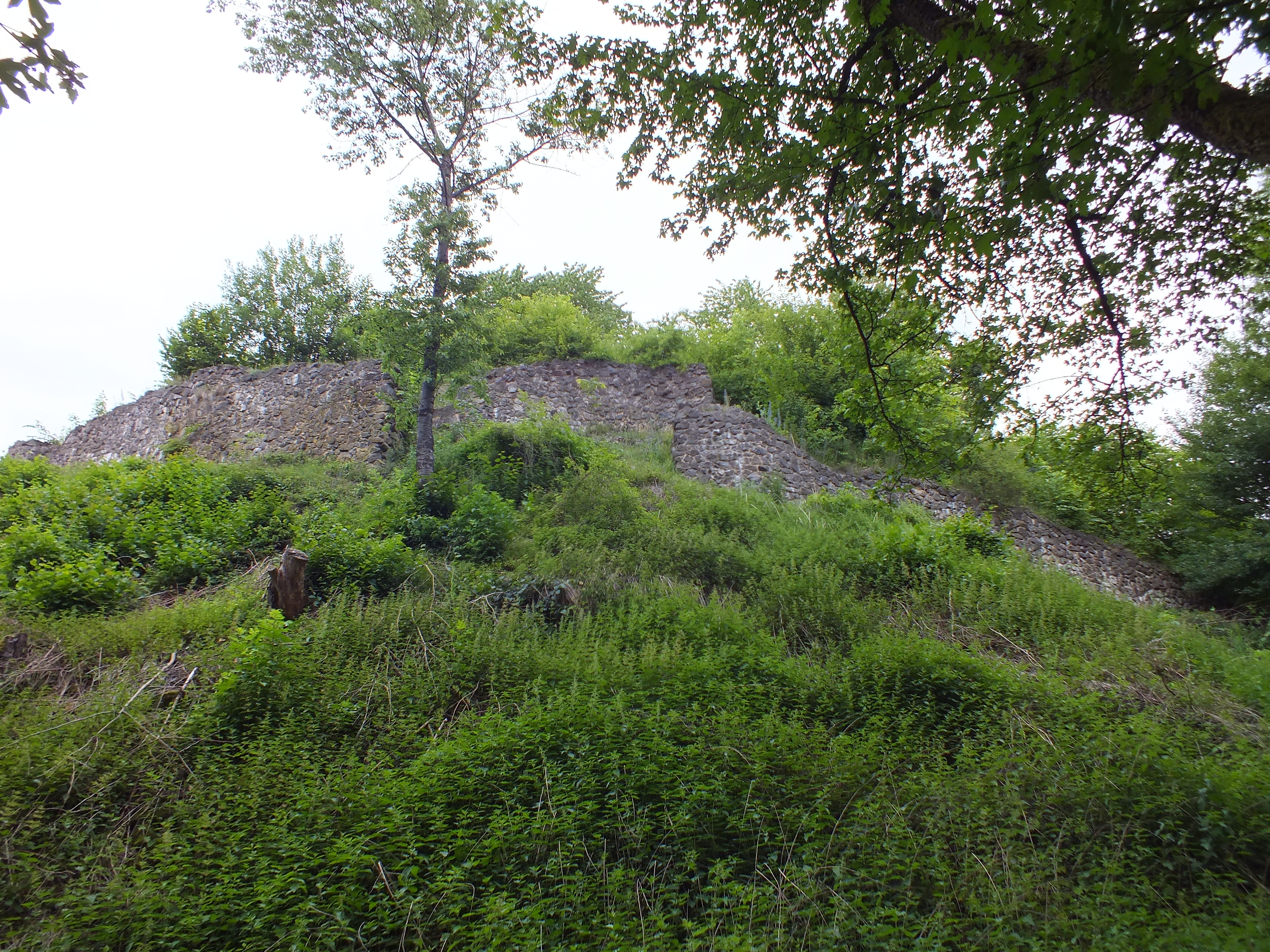 Bei Grabungen freigelegte Mauerreste der Burgruine Schauenburg